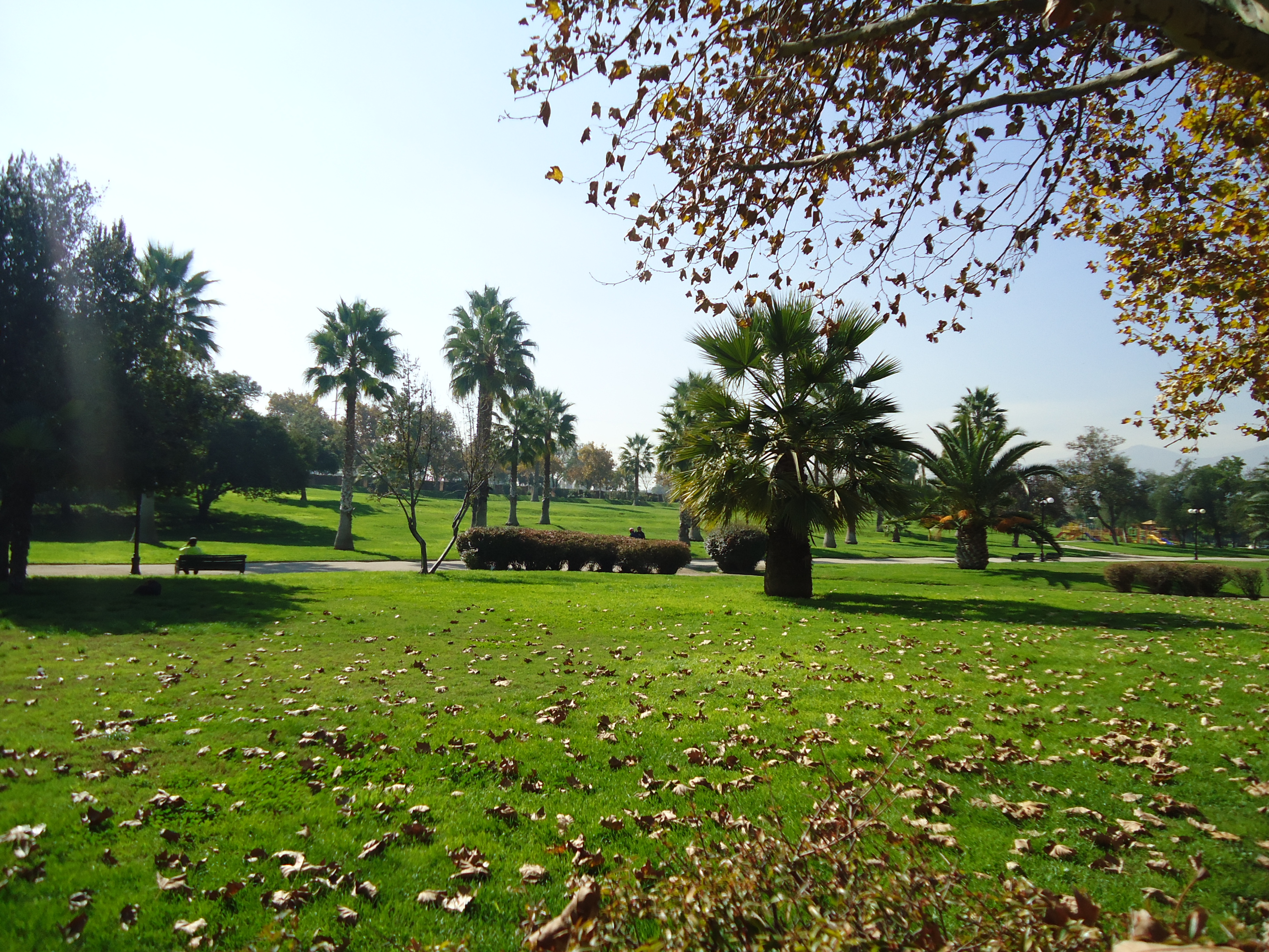 Vista parcial del parque de Los Reyes, Santiago de Chile.